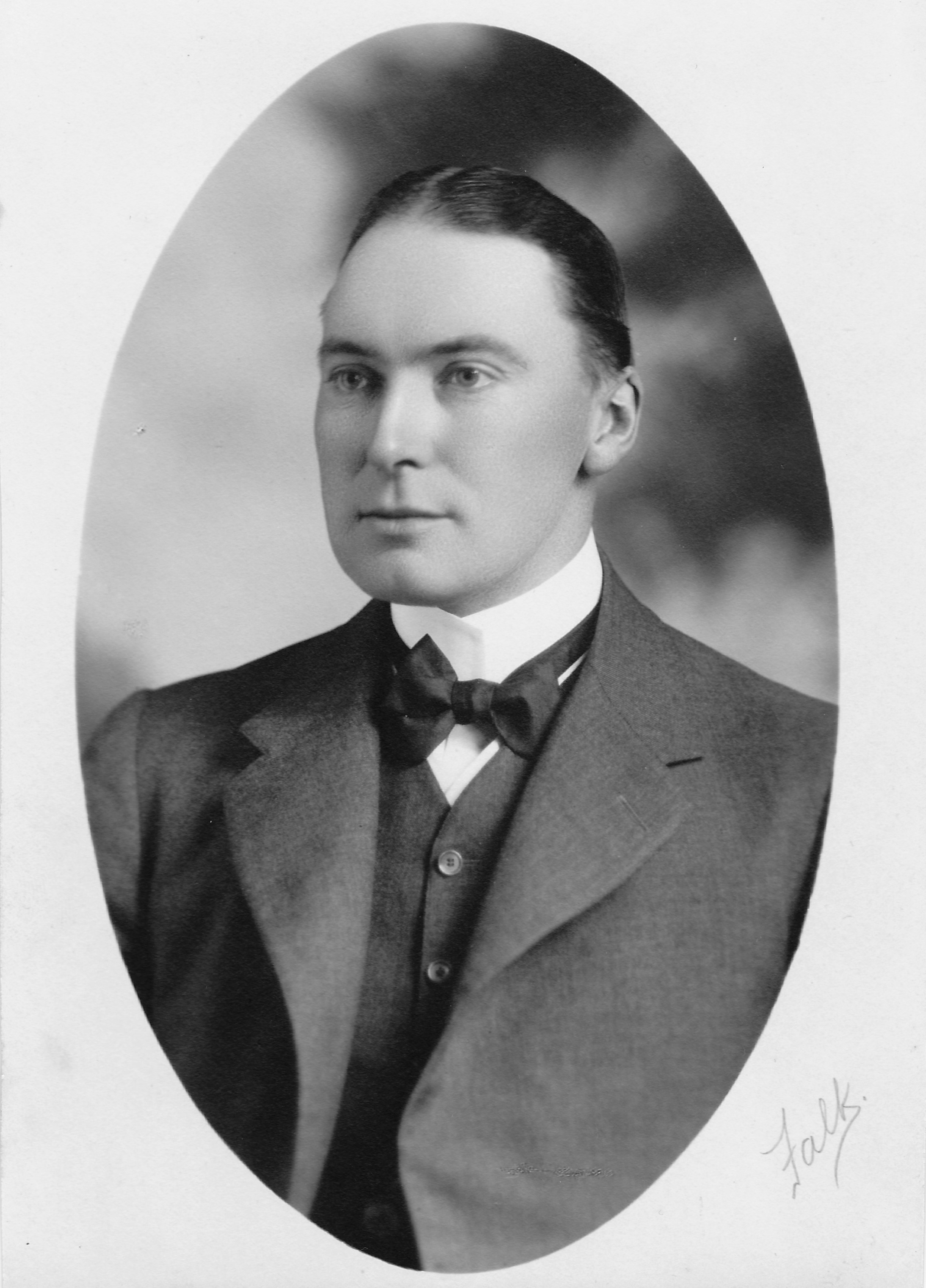 Porträtt av Robert Dickson